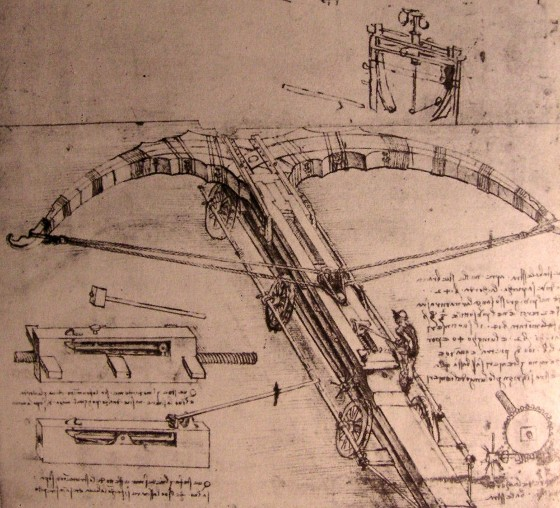 Leonardo da Vinci, design for an enormous crossbow